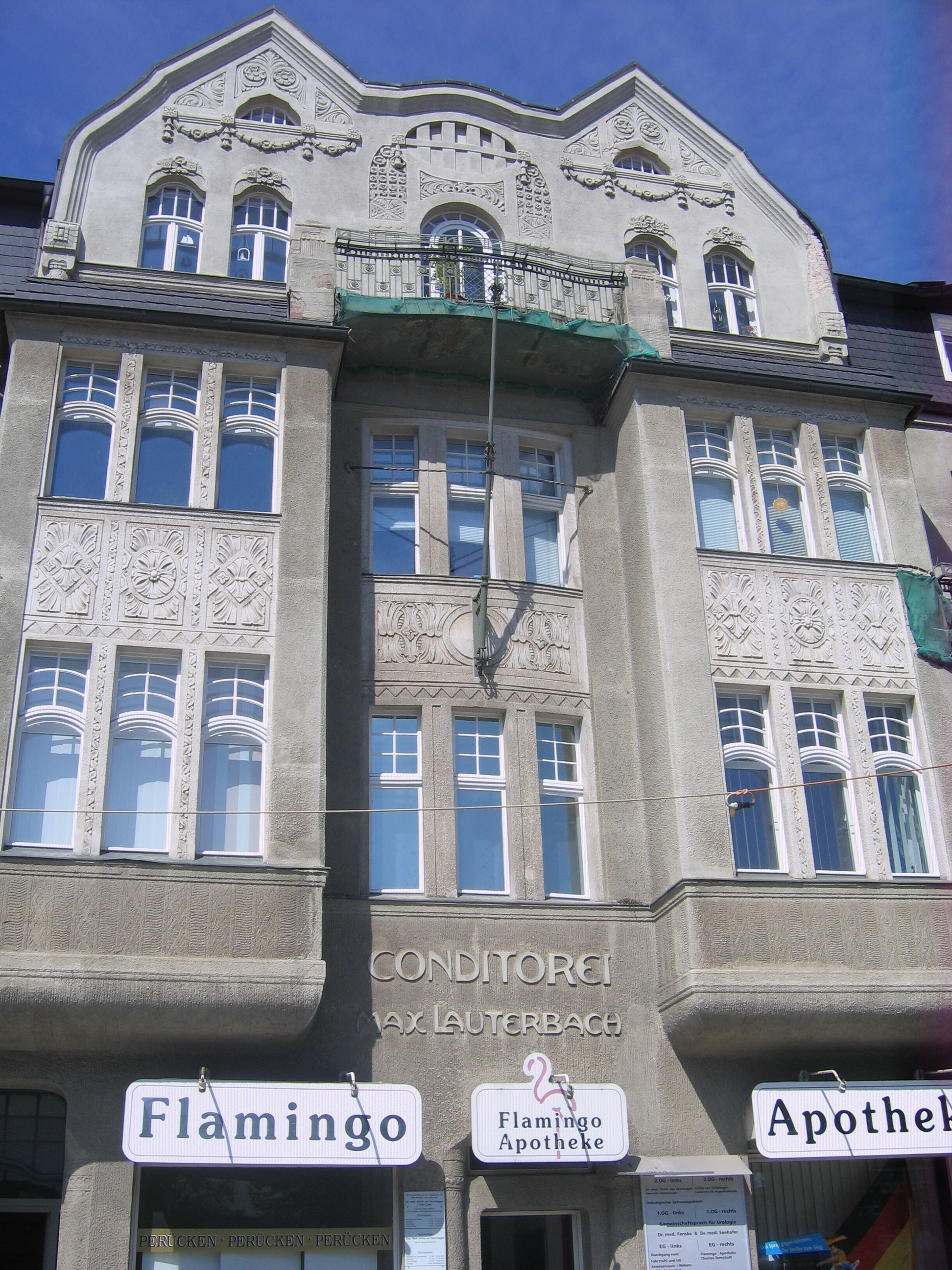 Denkmalgeschützte Fassade der bahnhofstraße 63 in Cottbus.